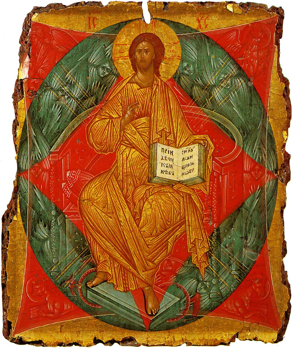 Спас в силах Рублев Андрей Школа или худ. центр: Москва 1410-е годы Выставка 1960: Ок. 1411 г. Лазарев 1966/1: Ок. 1411 г. Лазарев 1980: 1410–1415 гг. Лазарев 2000/1: 1410-е годы 18 × 16 см Государственная Третьяковская галерея, Москва, Россия Инв. 22124 Андрей Рублев. Спас в силах 10-е годы XV века. 18×16. Третьяковская галерея, Москва [22124]. Из собрания П. И. Севастьянова. Сохранность хорошая. Края доски изъедены шашелом. Икона восходит к аналогичной иконе Феофана Грека в Благовещенском соборе Московского Кремля и помогает уточнить утраченные детали на иконах из Владимирского иконостаса и из иконостаса Троицкого собора Троице-Сергиева монастыря. Ср. полное драматизма лицо Христа с фреской Успенского собора во Владимире, украшающей большой свод центрального нефа этого собора (Лазарев В. Н. Андрей Рублев и его школа, табл. 40–42). с. 367 ¦